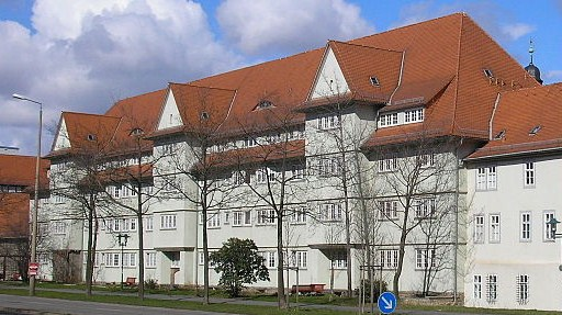 Das Hauptgebäude des Großen Hospitals in Erfurt (Thüringen).